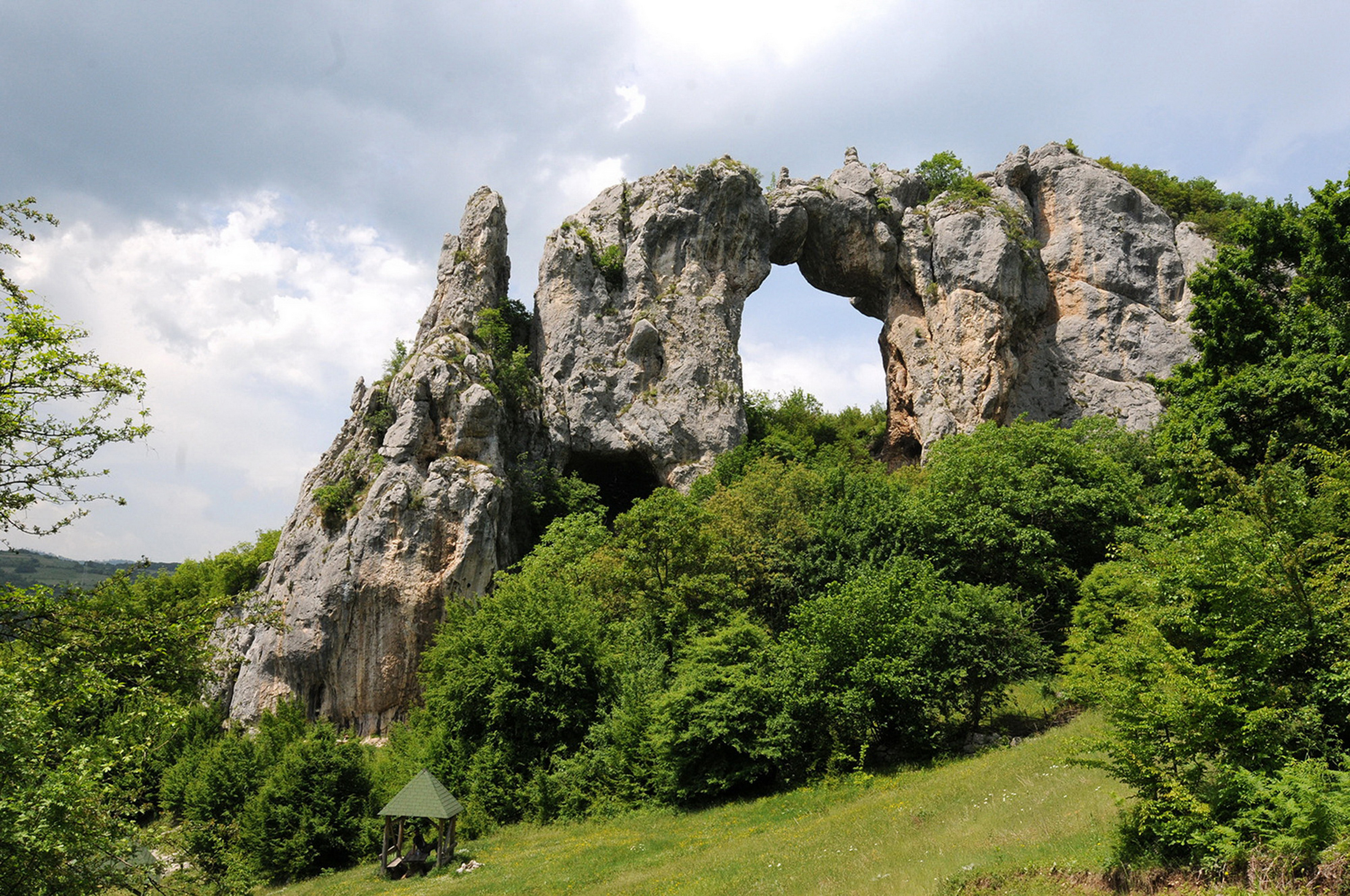 Krupa na vrbasu kameni most Сликава е подигната во рамките на проектот „По трагата на душата 2015“.